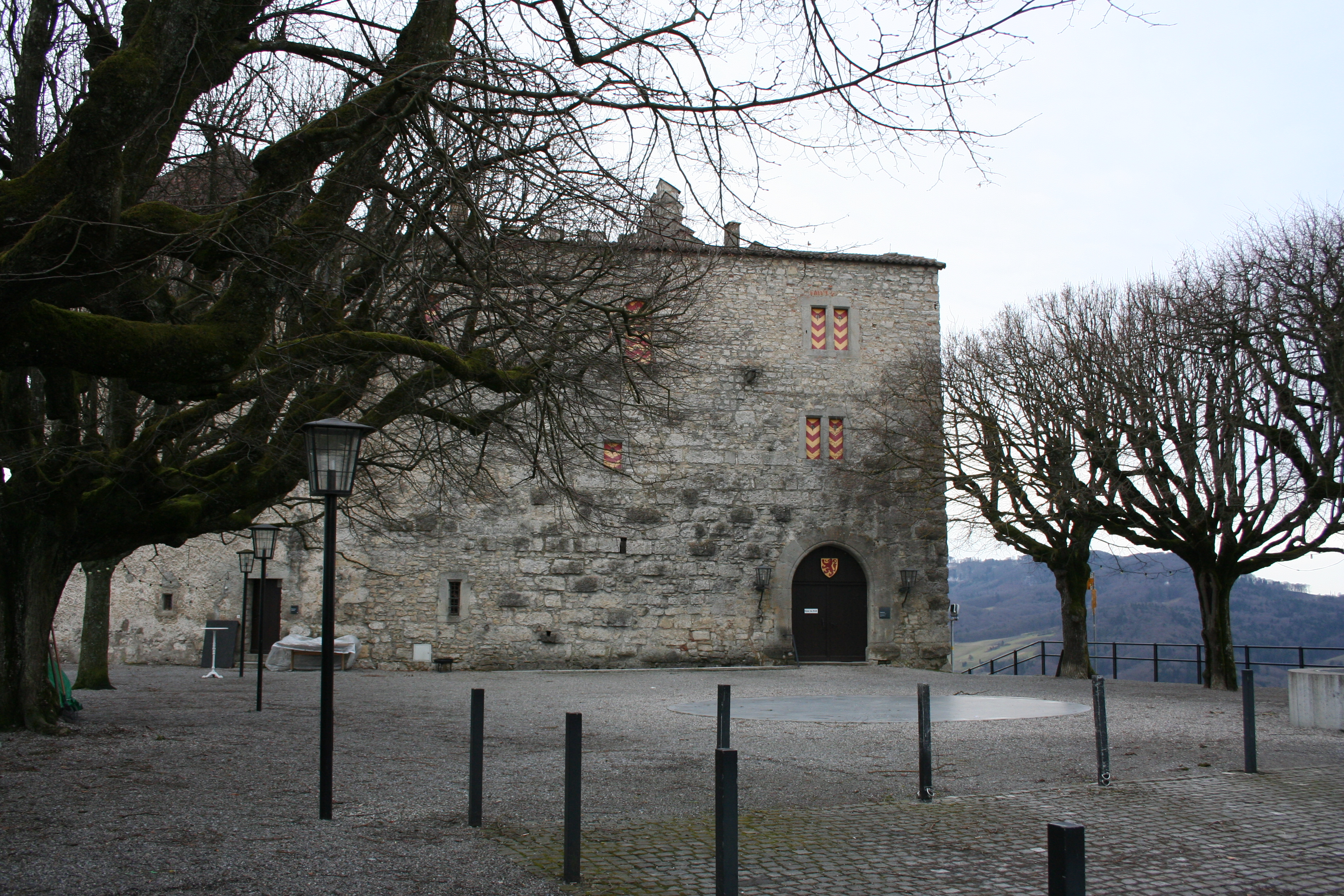 Habsburg (Burg)